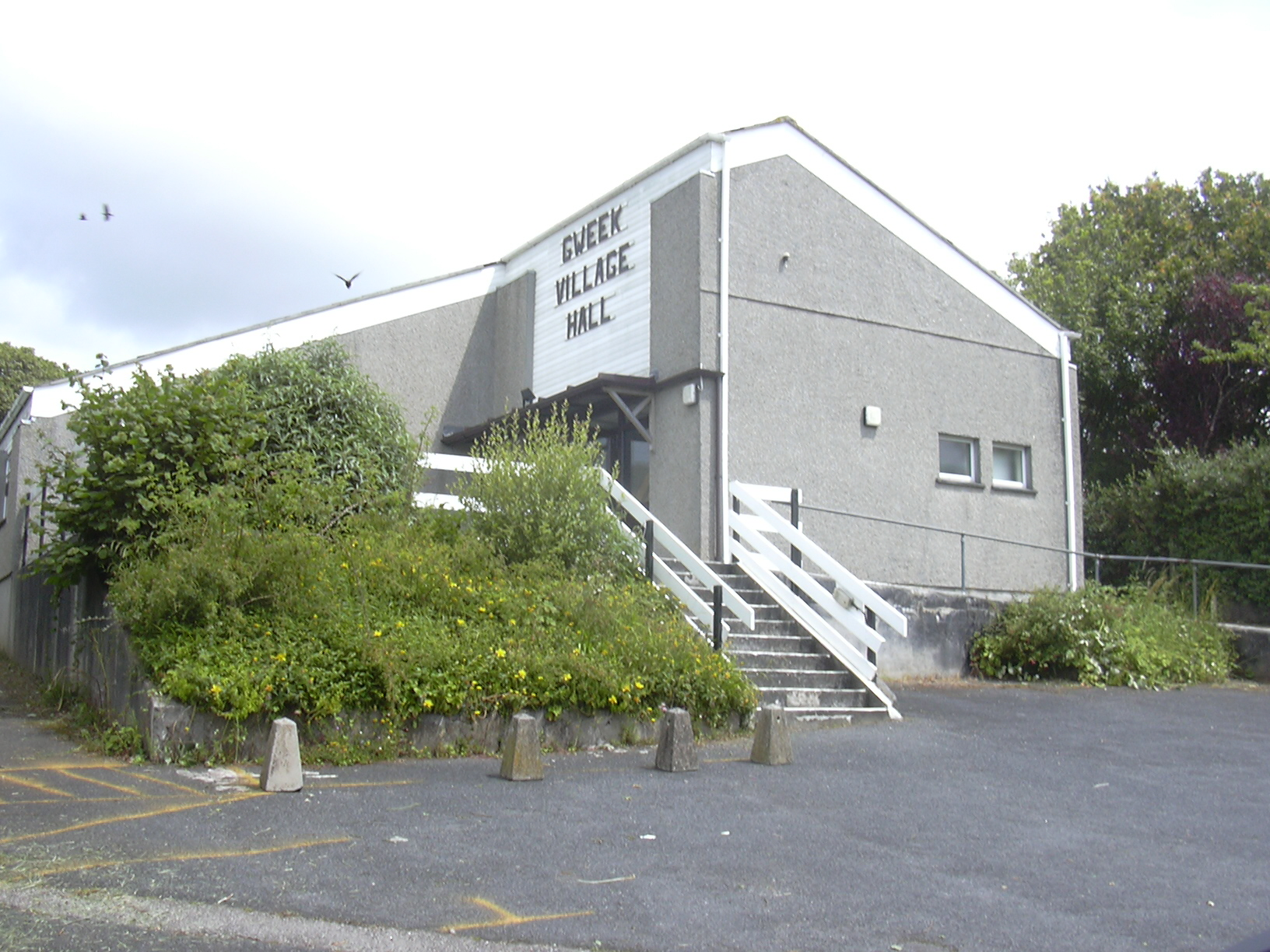 Gweek Village Hall, Kerrier, Cornwall